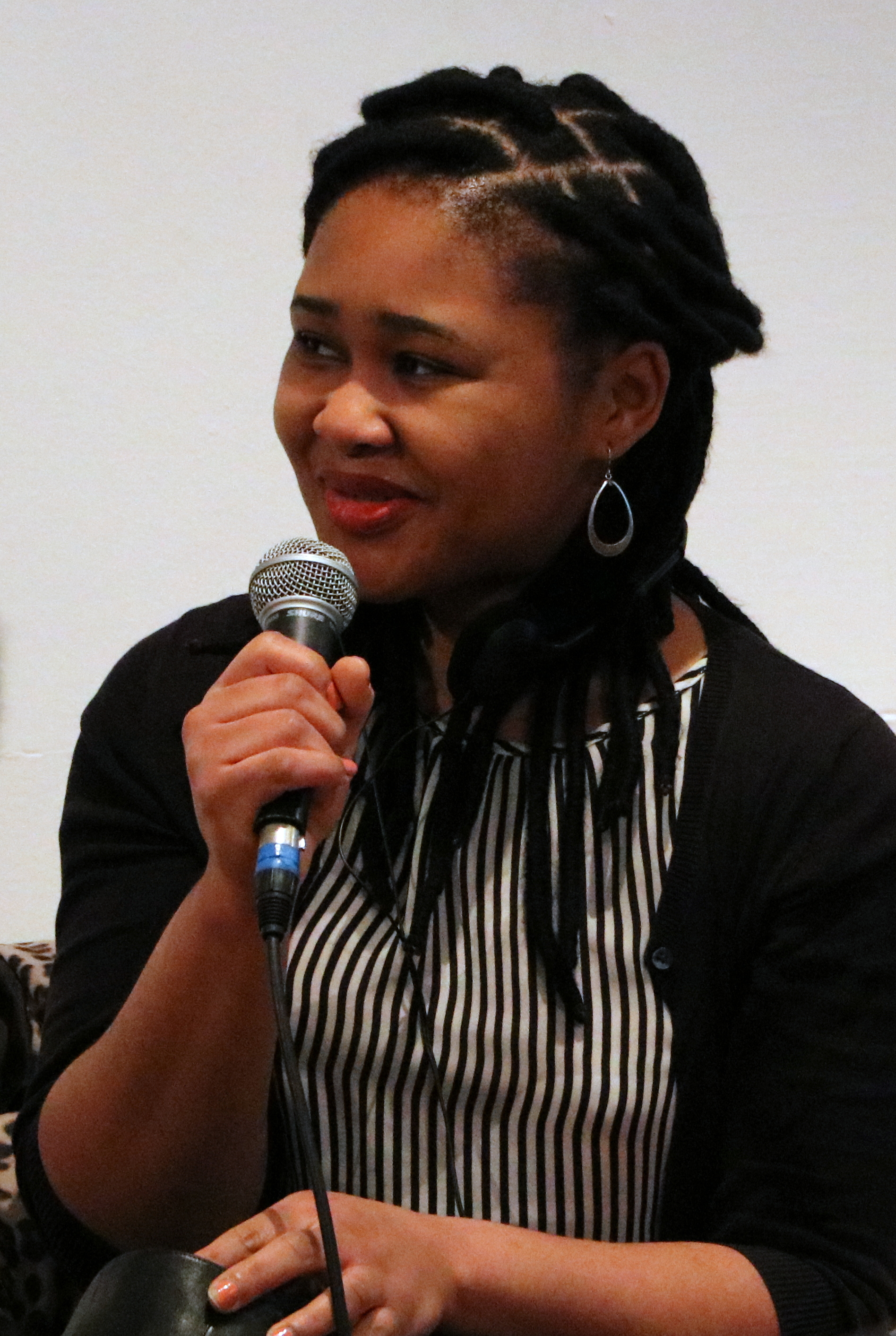 Chinelo Okparanta lors du Festival Atlantide - Les Mots du Monde à Nantes, le Lieu Unique, le 16 février 2018.